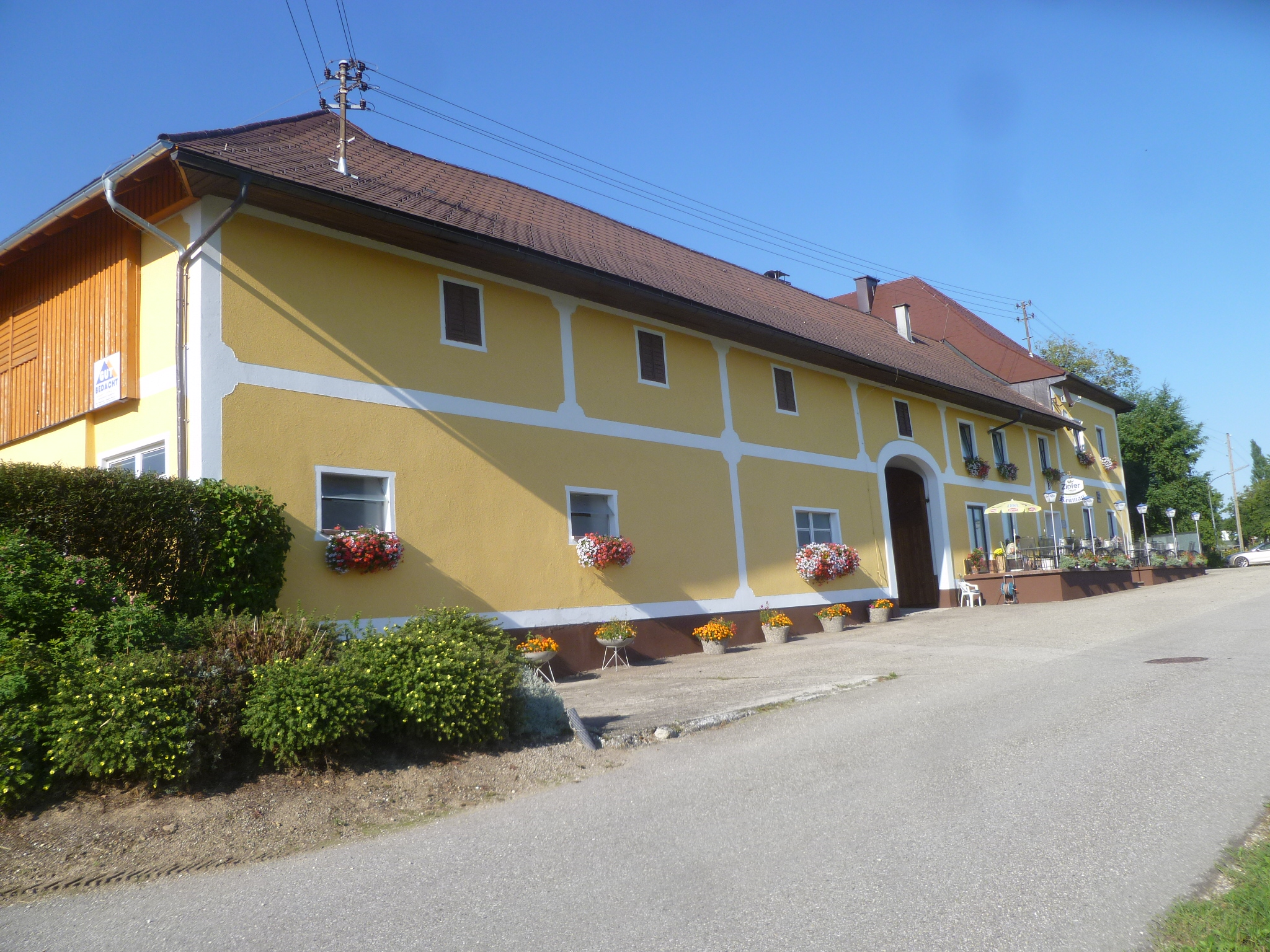 Ainwaldung(Schloss)